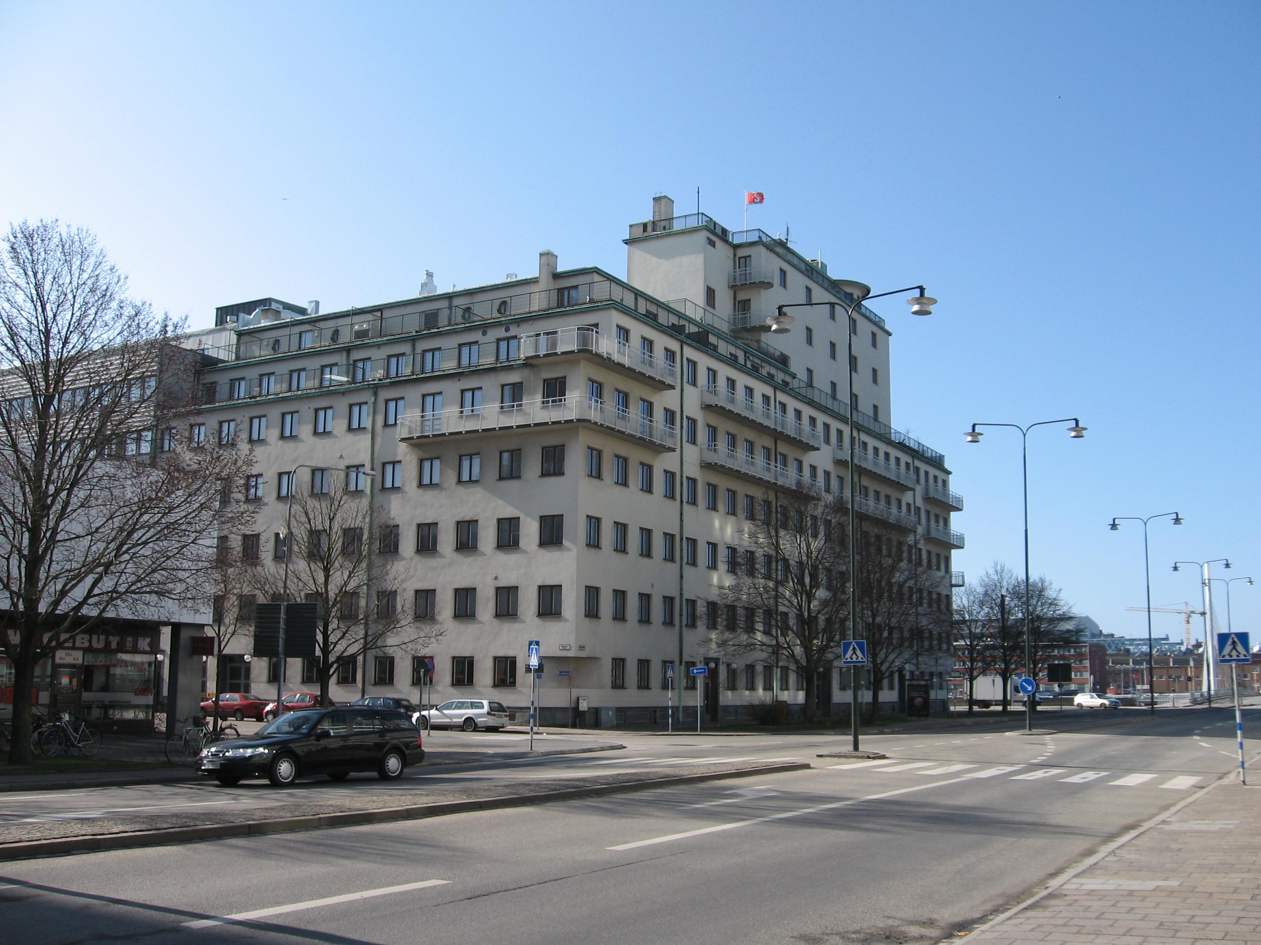 Kolgahuset i Malmö